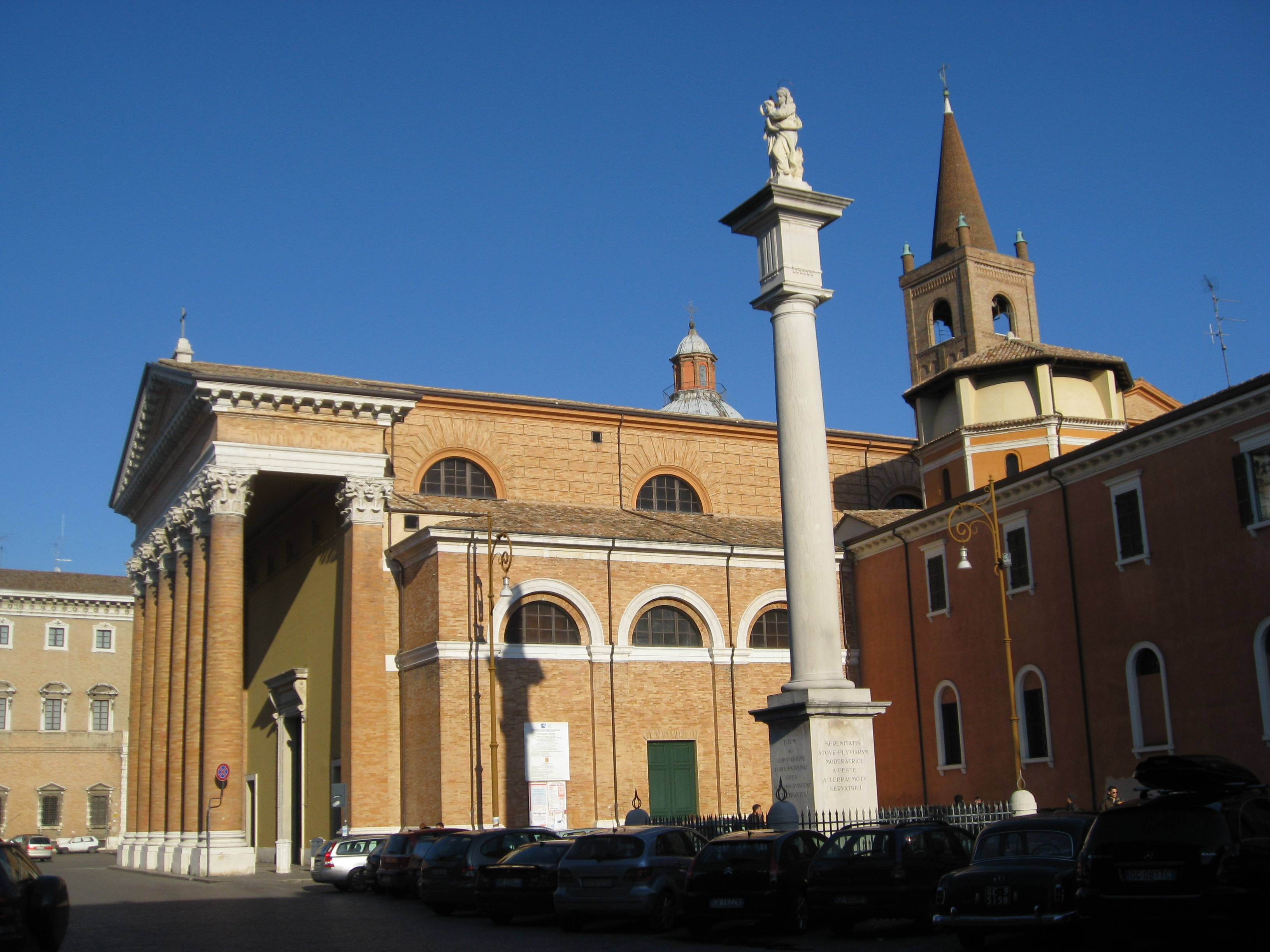 Duomo di Forlì, foto propria Licensing Categoria:Forlì